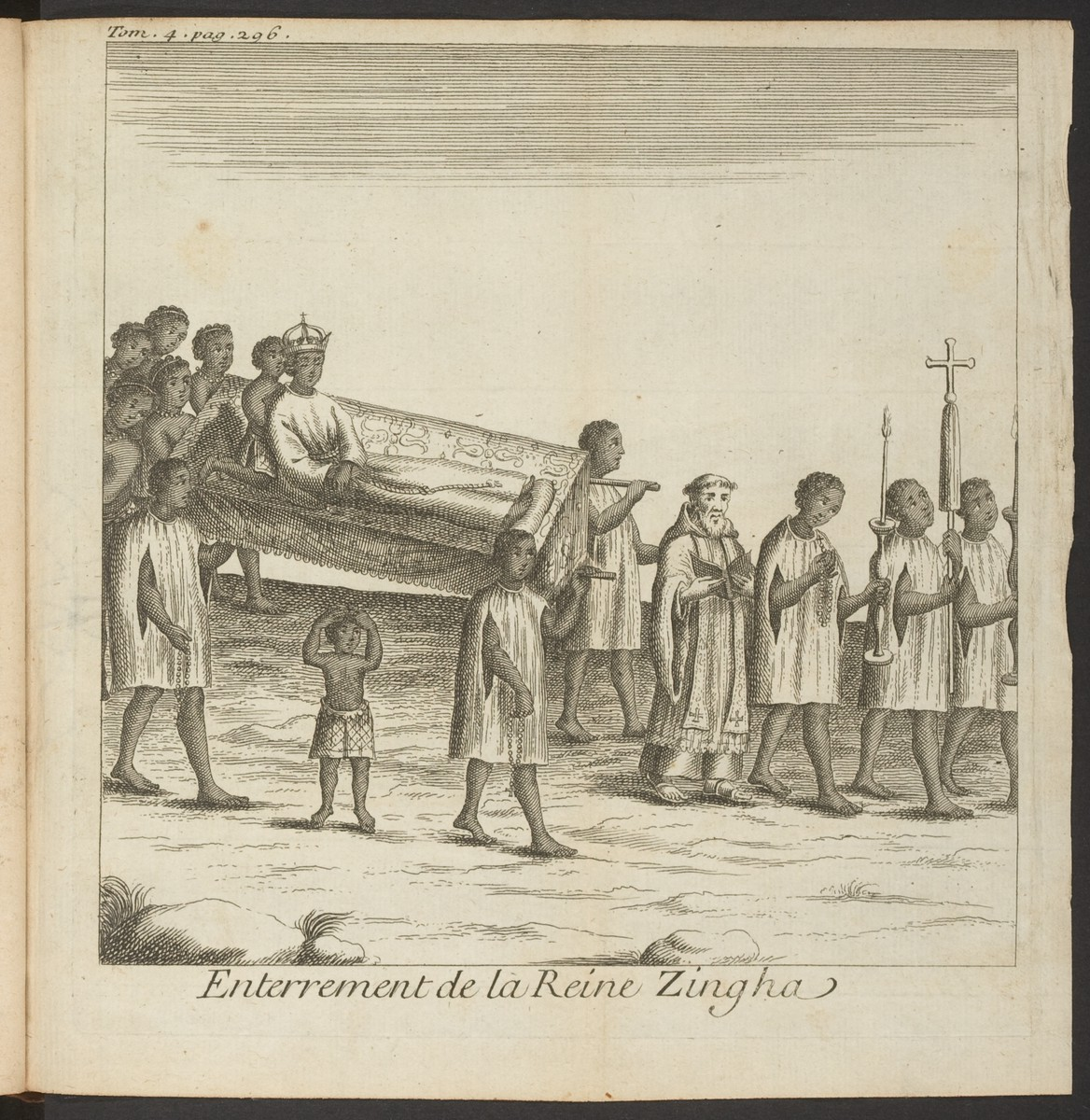 funerale della regina Nzinga di Angola (1583-1663)